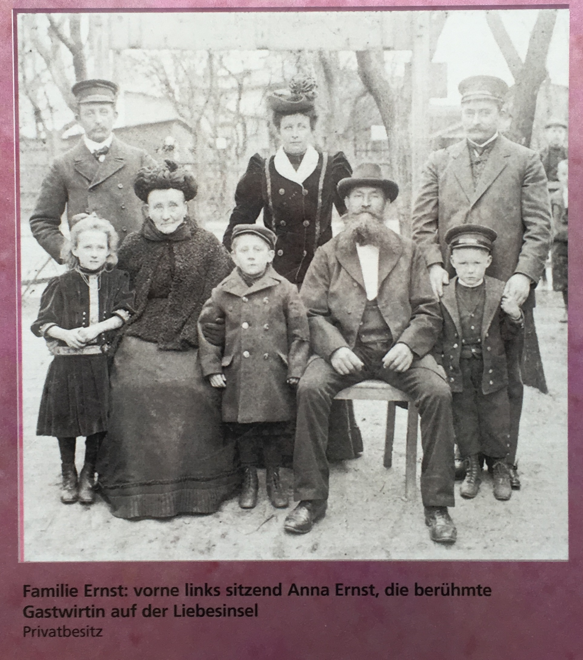 Historische Aufnahmen der Liebesinsel in Berlin-Friedrichshain, aufgenommen auf einer öffentlich zugänglichen Tafel an der Südspitze in Stralau.